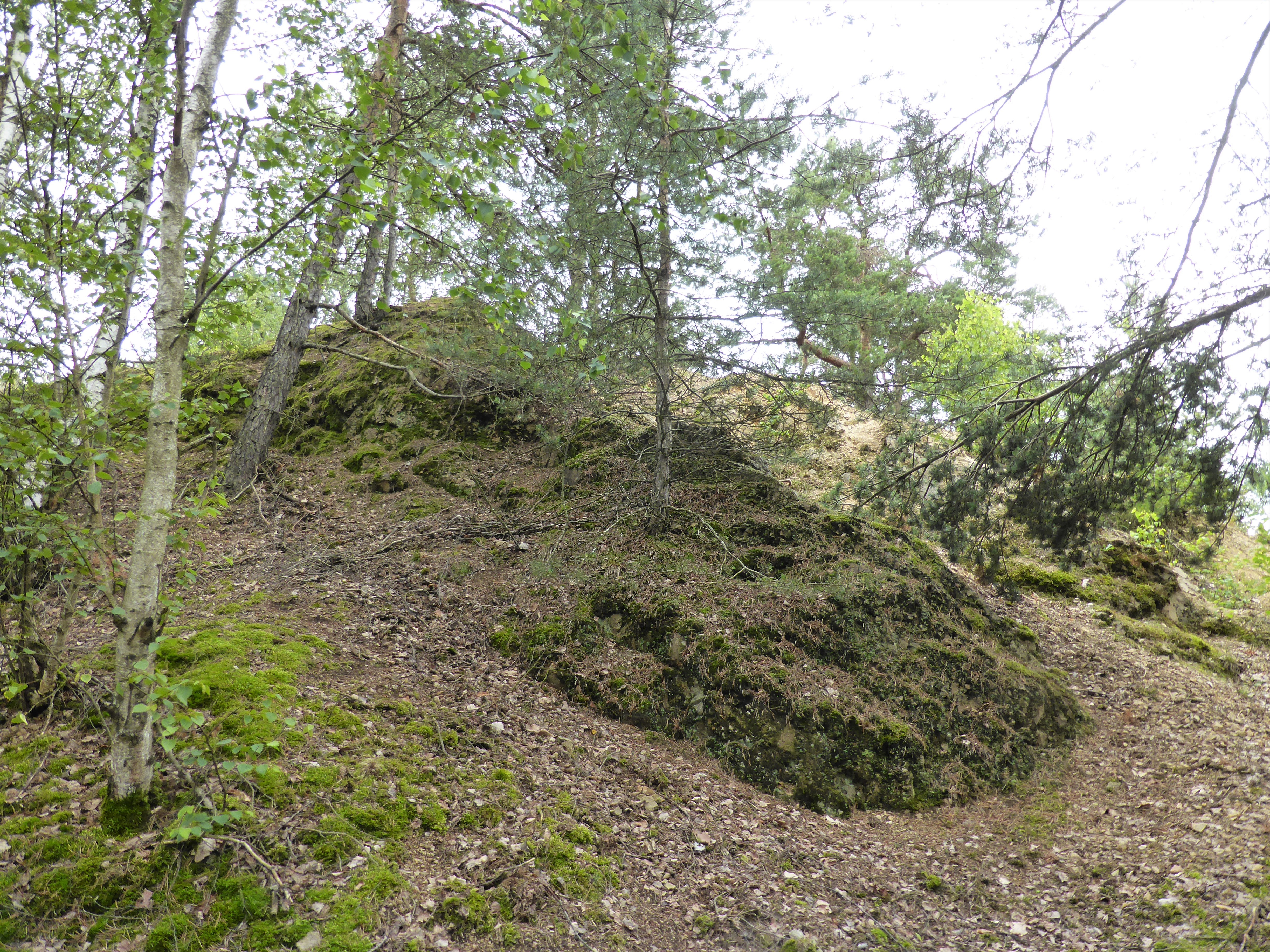 Der relativ kleine ehemalige Steinbruch befindet sich im FFH-Gebiet und ist teils zugewachsen. Steine des Steinbruchs wurden auch für den Pfahldrachen verwendet. Es handelt sich hierbei jedoch nicht um Quarz.